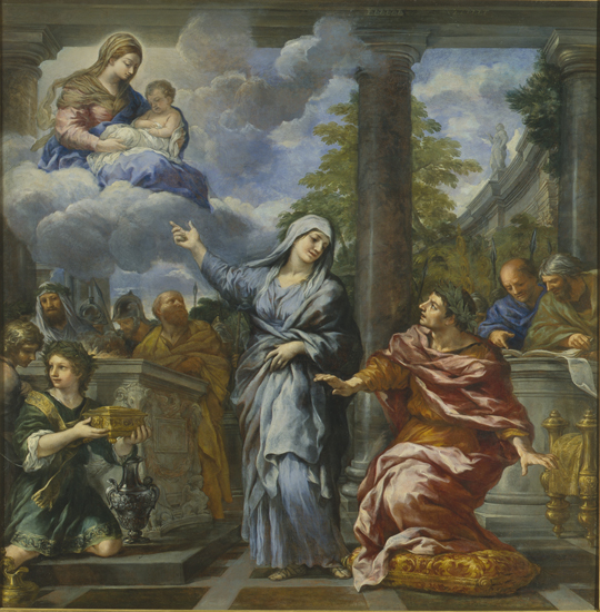 La Sibylle de Tibur annonçant à Auguste l'avènement du Christlabel QS:Lfr,"La Sibylle de Tibur annonçant à Auguste l'avènement du Christ"